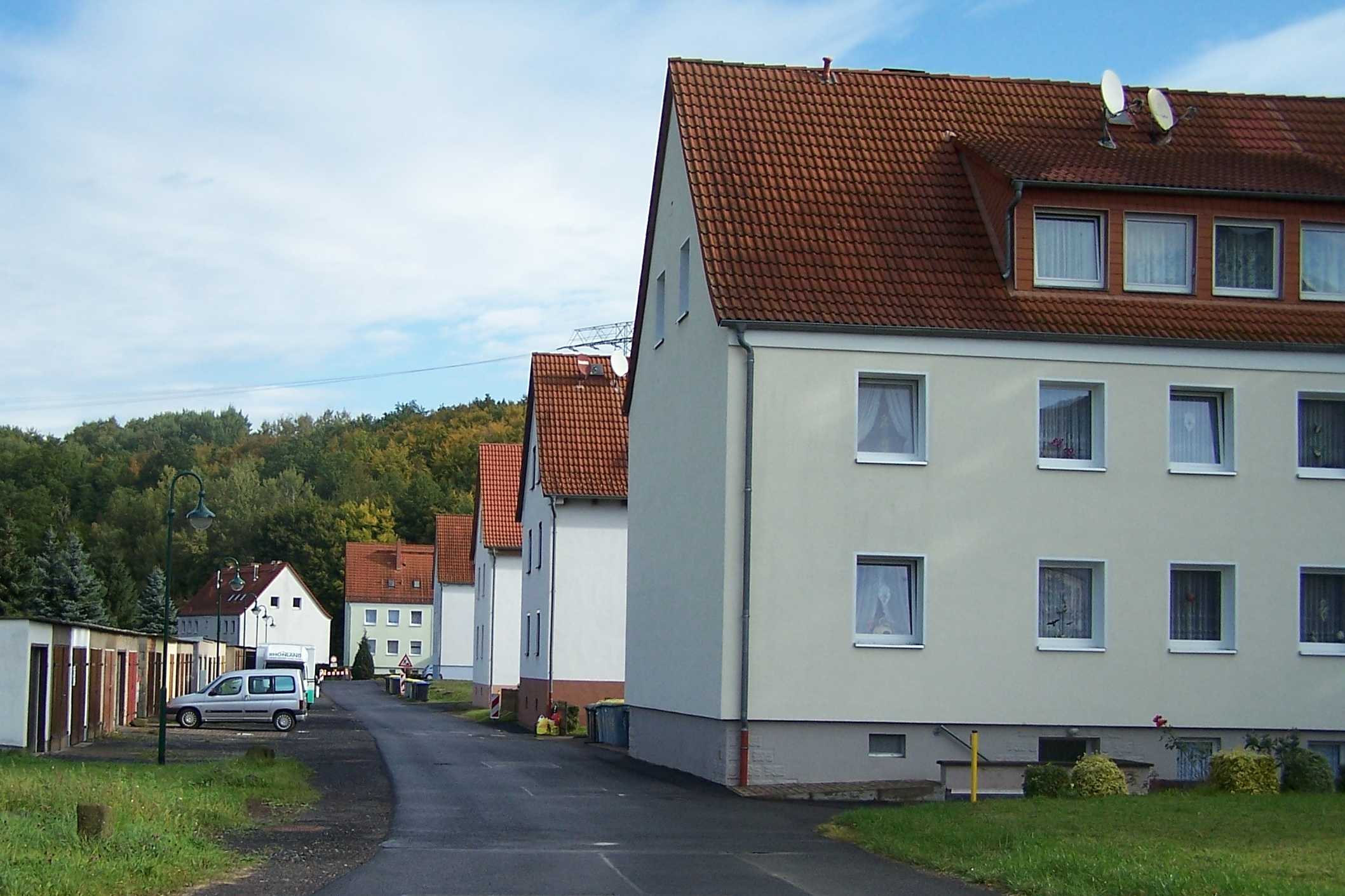 Häuserzeile der Bergarbeitersiedlung in der Ortslage von Räsa.